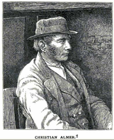 Portrait du guide Christian Almer par Edward Whymper